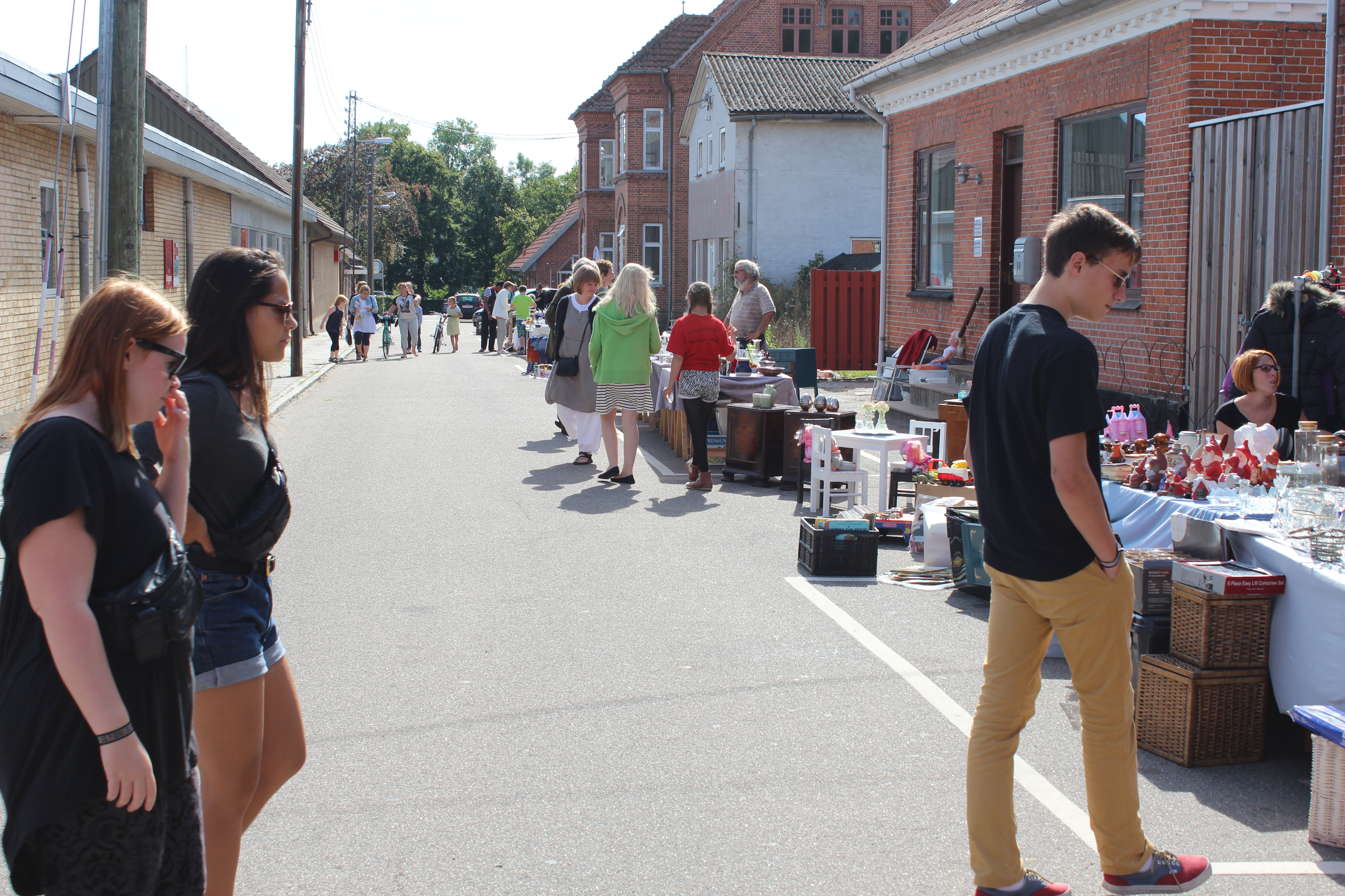 Et loppemarked, hvor private sælger deres brugte ting